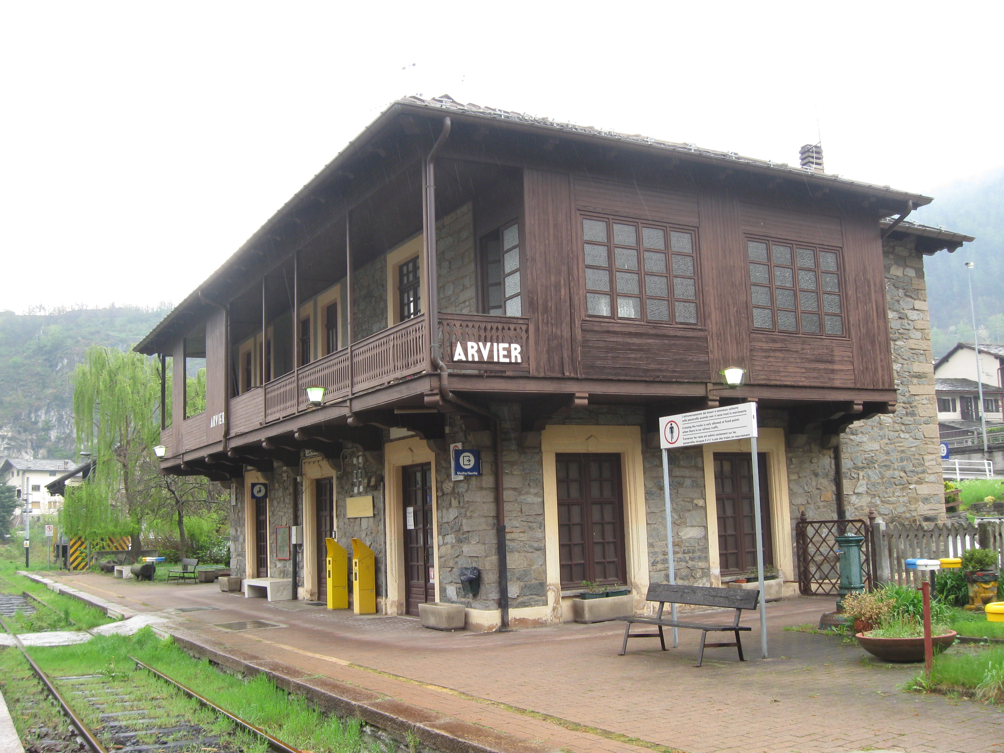 Stazione di Arvier (AO)